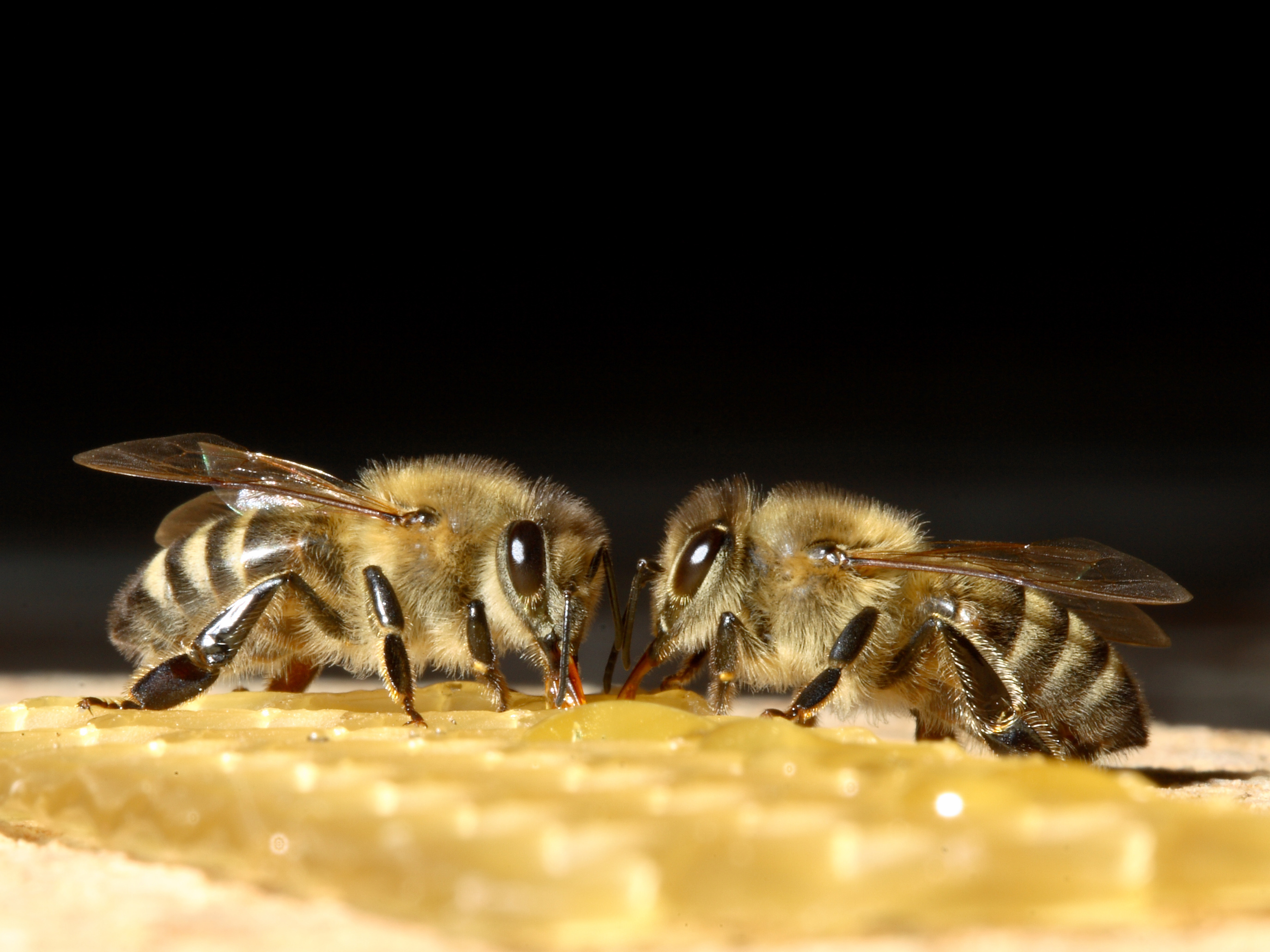 Westliche Honigbienen saugen an einem Honigtropfen